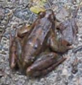 Rana pyrenaica